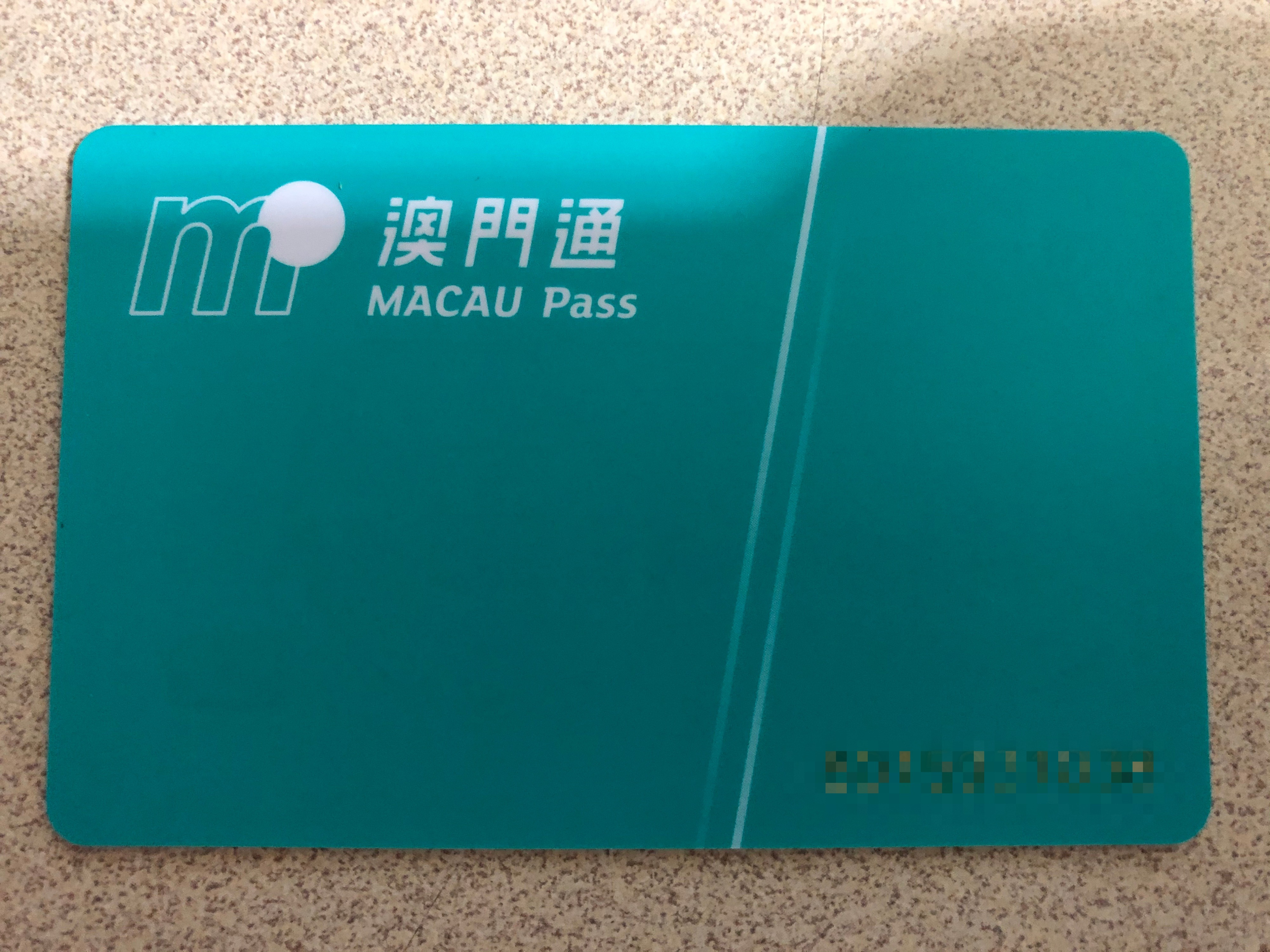 第三代澳門通卡，採用新版澳門通標誌，並以湖水綠作為卡面顏色。